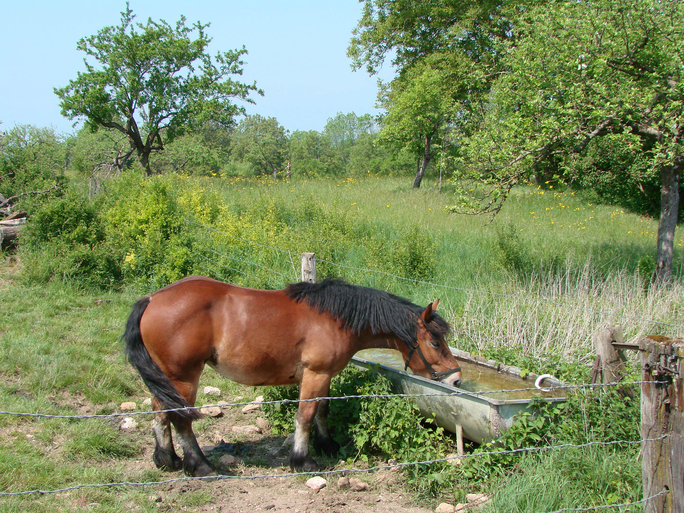 Abreuvoir dans un pré. Ardennes (08)